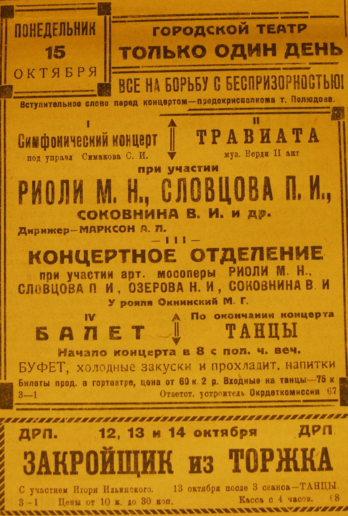 Анонс концерта Словцова и Соковнина